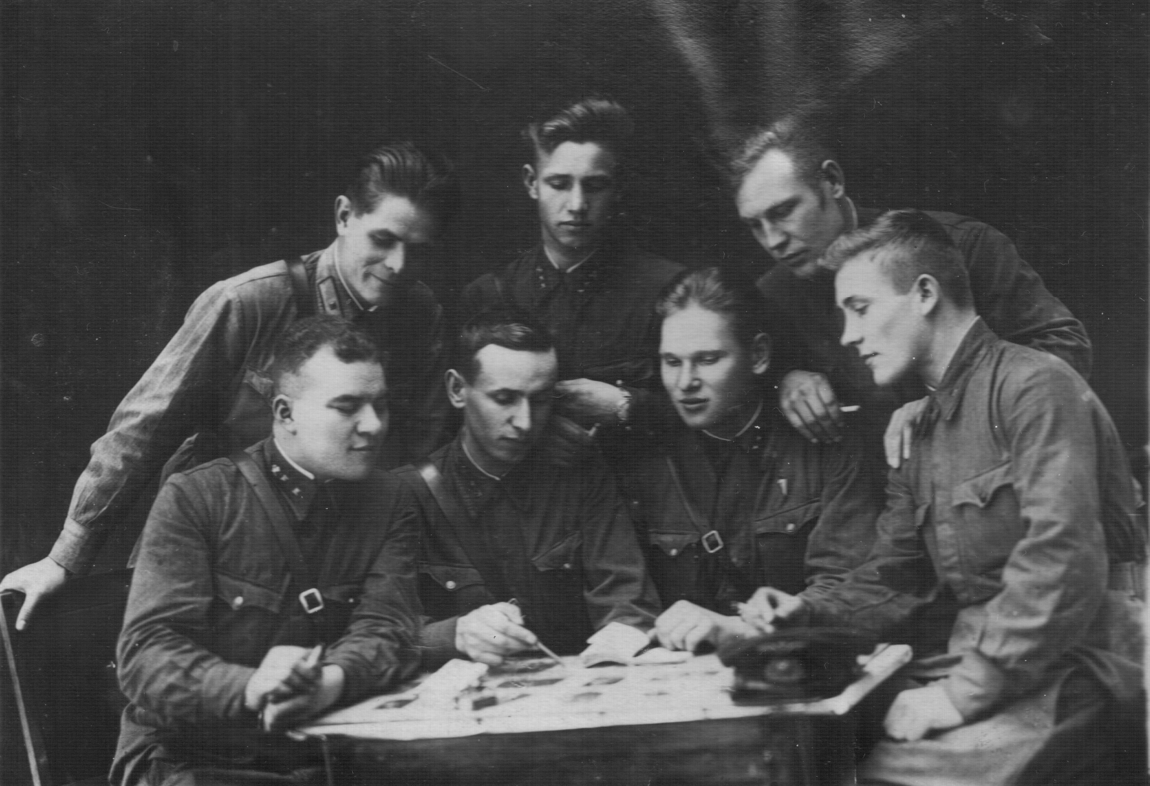 Формирование 866 истребительного авиаполка, 01 декабря 1941г.